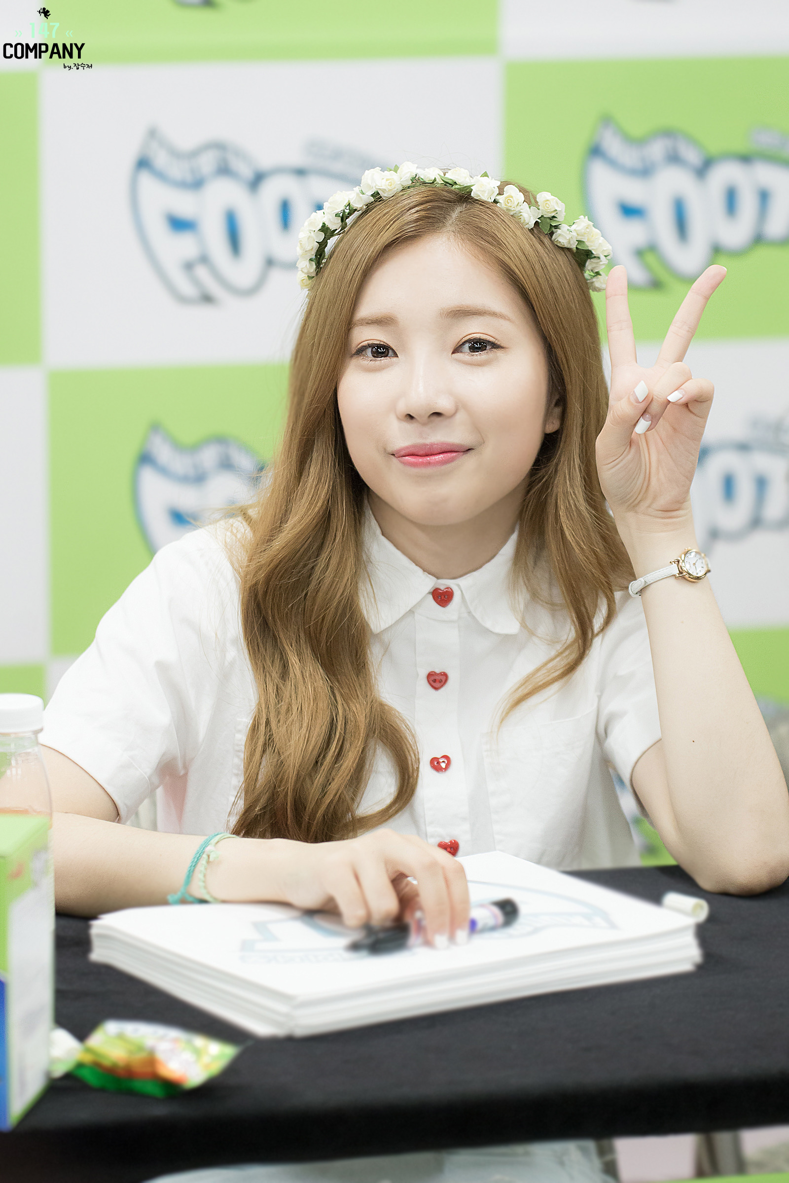 한국어 (조선): [16.07.28] 풋젤리 팬싸인회